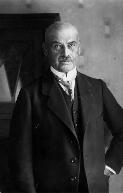 Otto Liman von Sanders General Liman von Sanders, der Türkenmarschall, wird 70 Jahre alt. Der bekannte Führer der türkischen Armee im Weltkriege, General der Kavallerie Liman von Sanders wird am 18.2. 70 Jahre alt. Er übernahm 1913 die Leitung der deutschen Militär-Mission in der Türkei und führte während des Krieges persönlich die erfolgreiche Verteidigung von Gallipoli und war bis zum Waffenstillstand Oberbefehlshaber der Palästina-Front. Später wurde er folgerechtswidriger Weise von den Engländern gefangen gesetzt. Seine Kriegserinnerungen sind als Buch unter dem Titel "5 Jahre Türkei" erschienen. [Otto Liman von Sanders (Porträt)] Abgebildete Personen: Liman von Sanders, Otto: General, Oberbefehlshaber der Türkischen Armee, Deutschland (GND 11878000X)